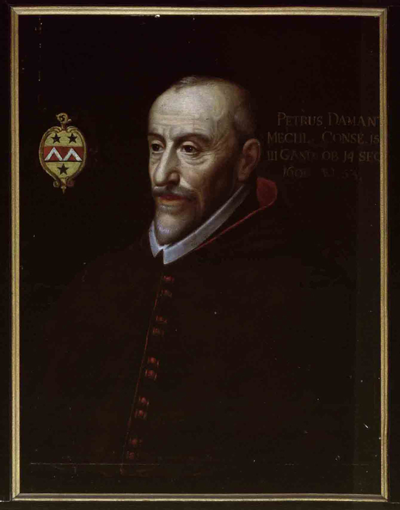 Sint-Baafskathedraal, Gent Portret van Mgr. Petrus Damant; inv nr: 499/3